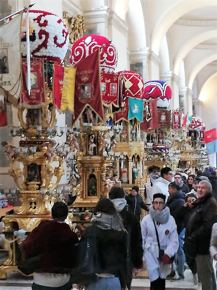 Candelore ricoverate in cattedrale per previsione pioggia il 05 02 2020. This photo has been taken in the country: Italy